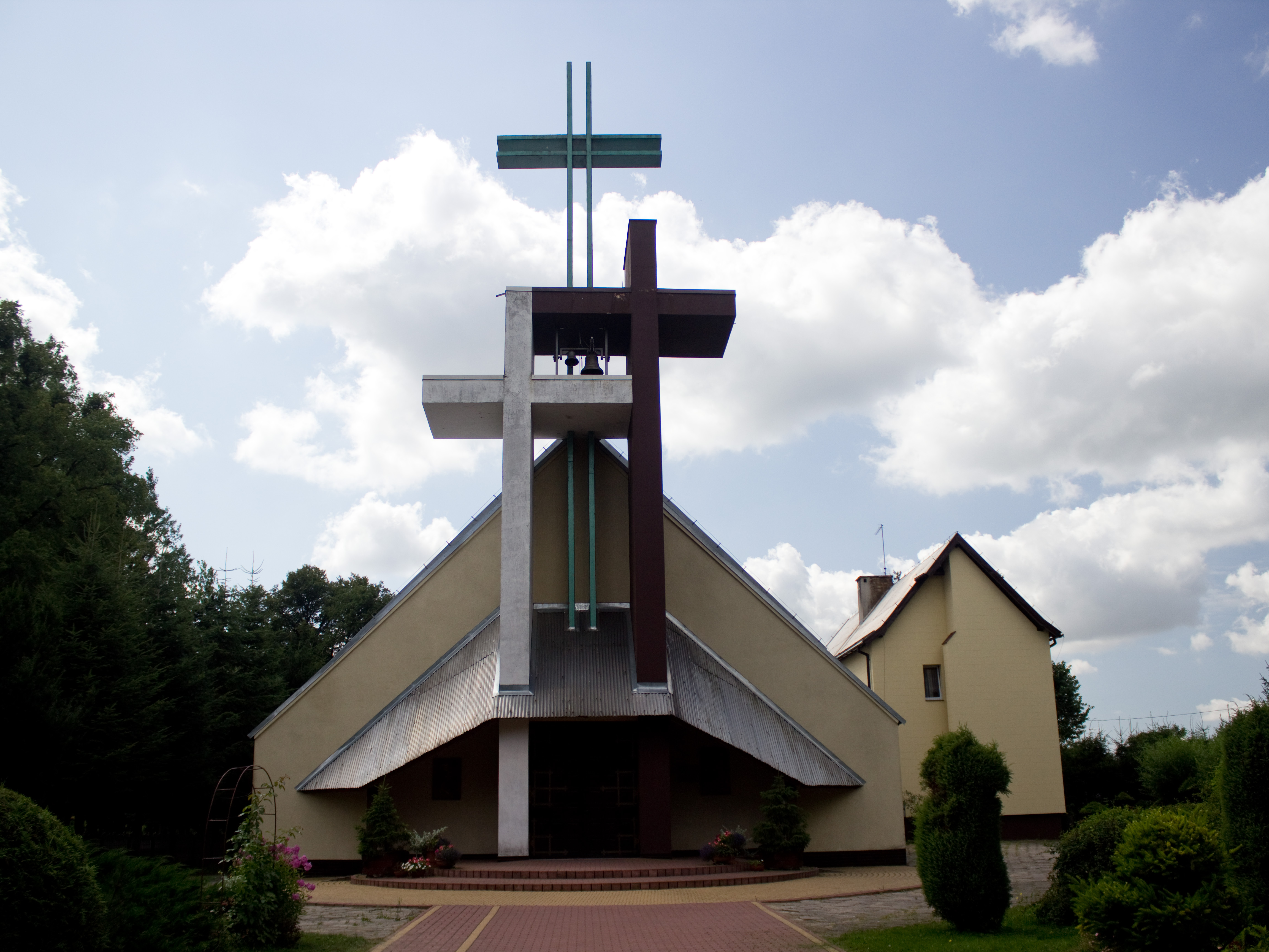 Bezledy - rzymskokatolicki kościół parafialny p.w. św. Maksymiliana Marii Kolbe